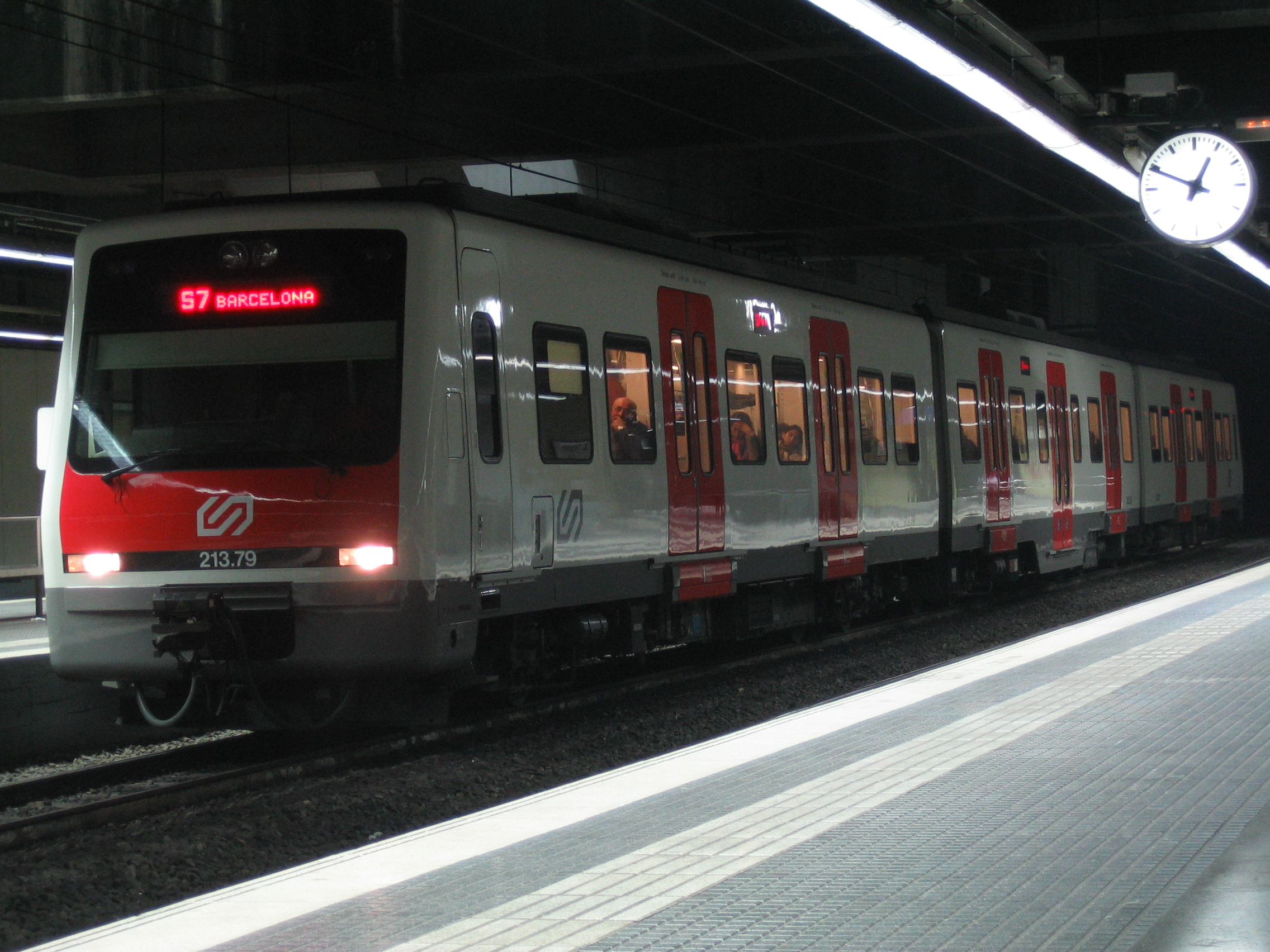 Foto hecha por mí desde la estación de L’Hospitalet - Av.Carrliet en horizontal, el viernes 24 de Febrero del 2006 a las 12:48 del mediodía. Con la cámara CANON ixus 40